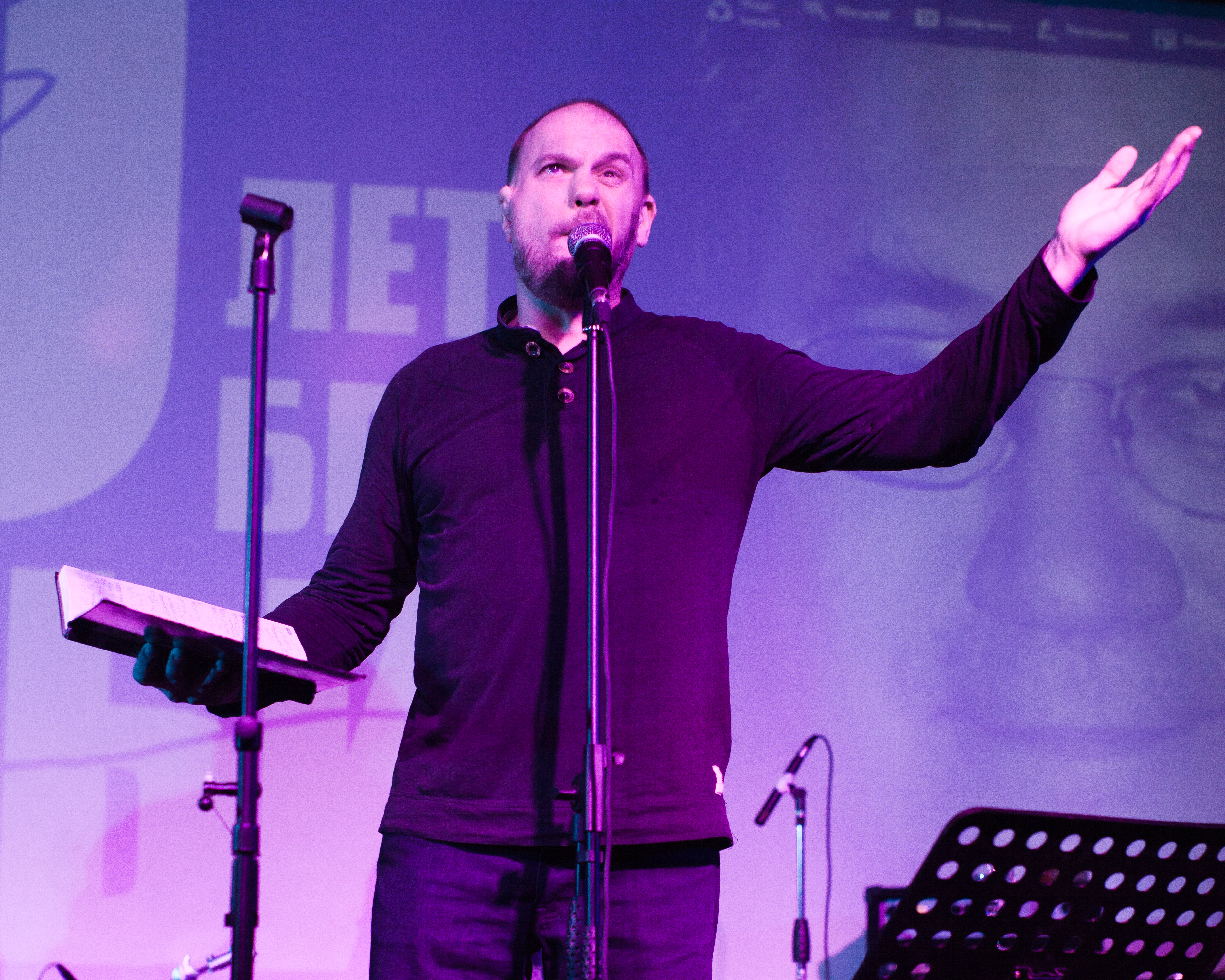 Поэт Андрей Родионов на концерте памяти Ильи Кормильцева